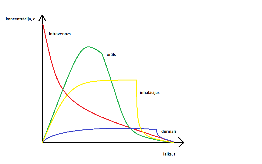 dažādu zāļu ievades veidu laika un koncentrācijas attiecības salīdzinājums